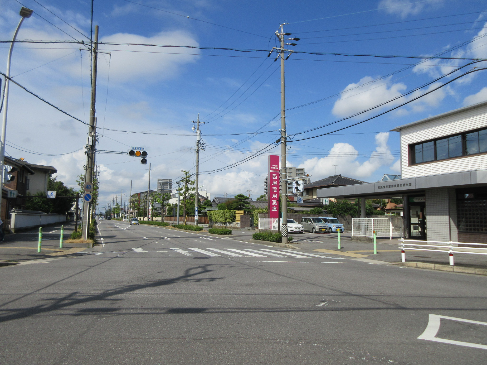 愛知県道479号熊味岡崎線。終点の柱町土取交差点（岡崎市）。